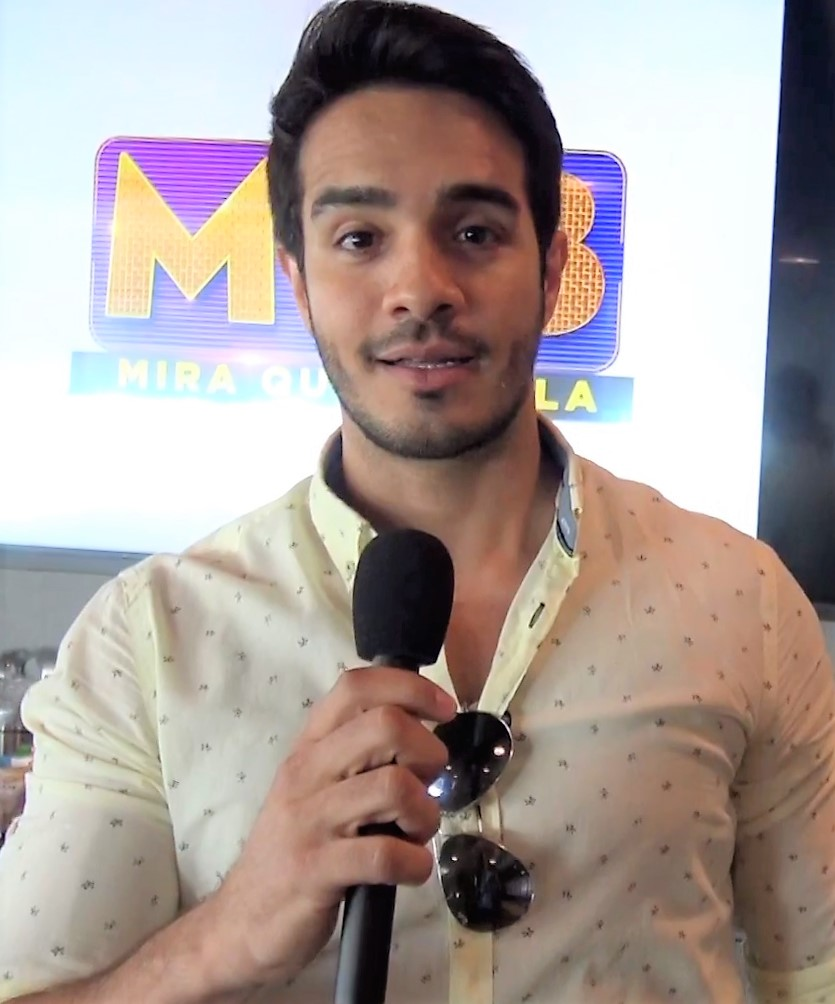 JLO visitó a Ektor Rivera en su casa, conocelo a fondo aquí y en "Mira Quien Baila" Visita by Dulce Osuna